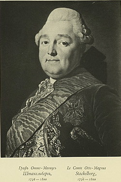 RusPortraits v4-142 Otto Magnus von Stackelberg 1736-1800